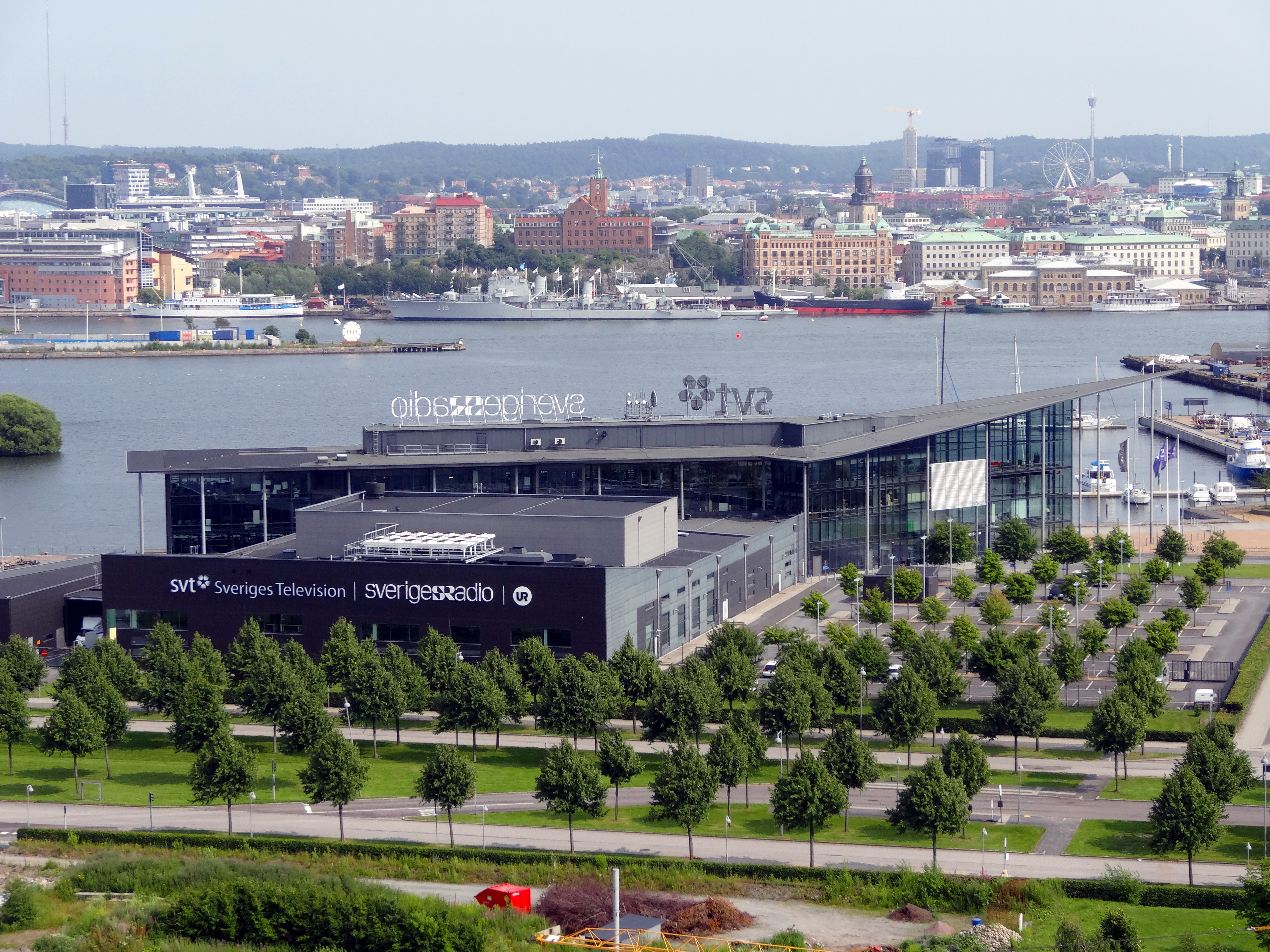 Kanalhuset (TV-huset) på Norra Älvstranden i Göteborg. Vy från Ättestupan (Keillers park).